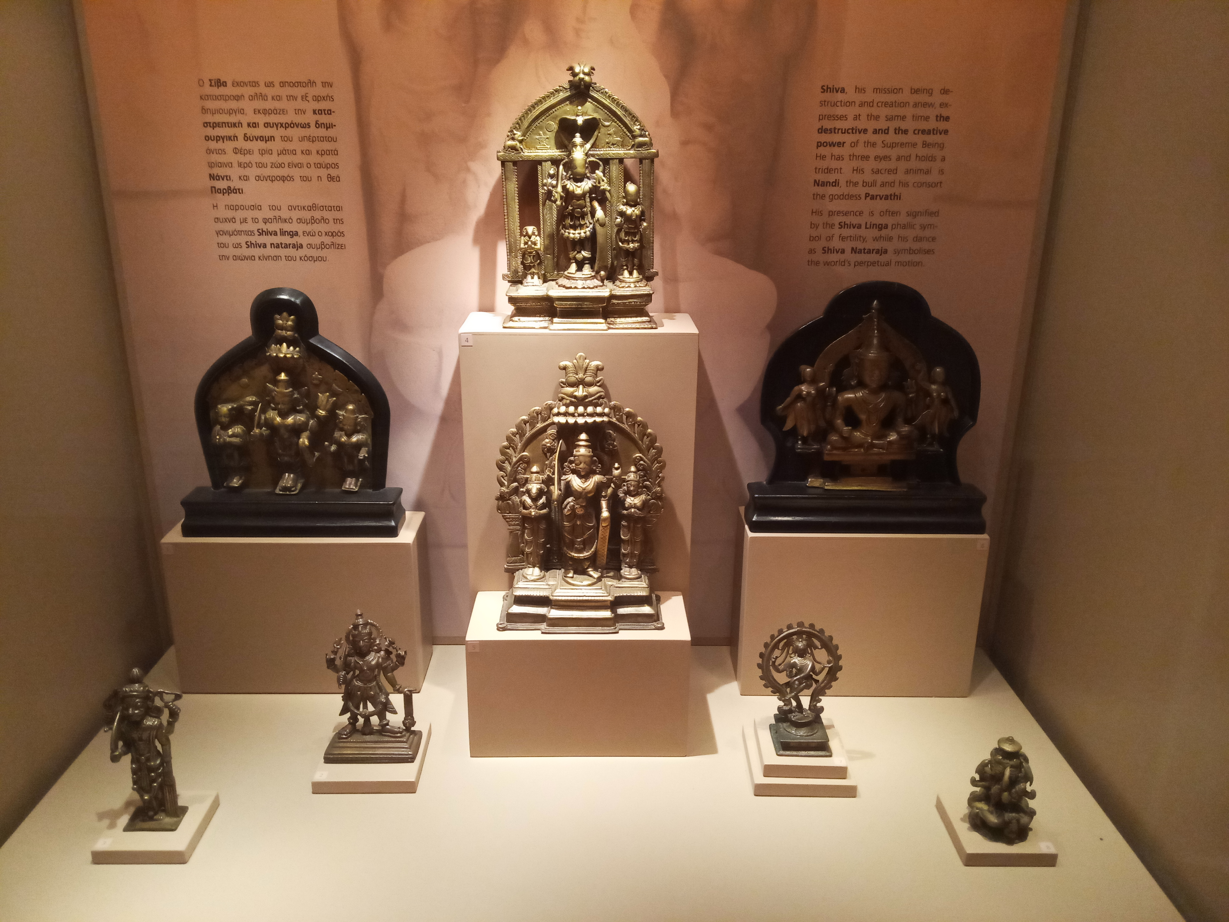 Музей азійського мистецтва Керкіри